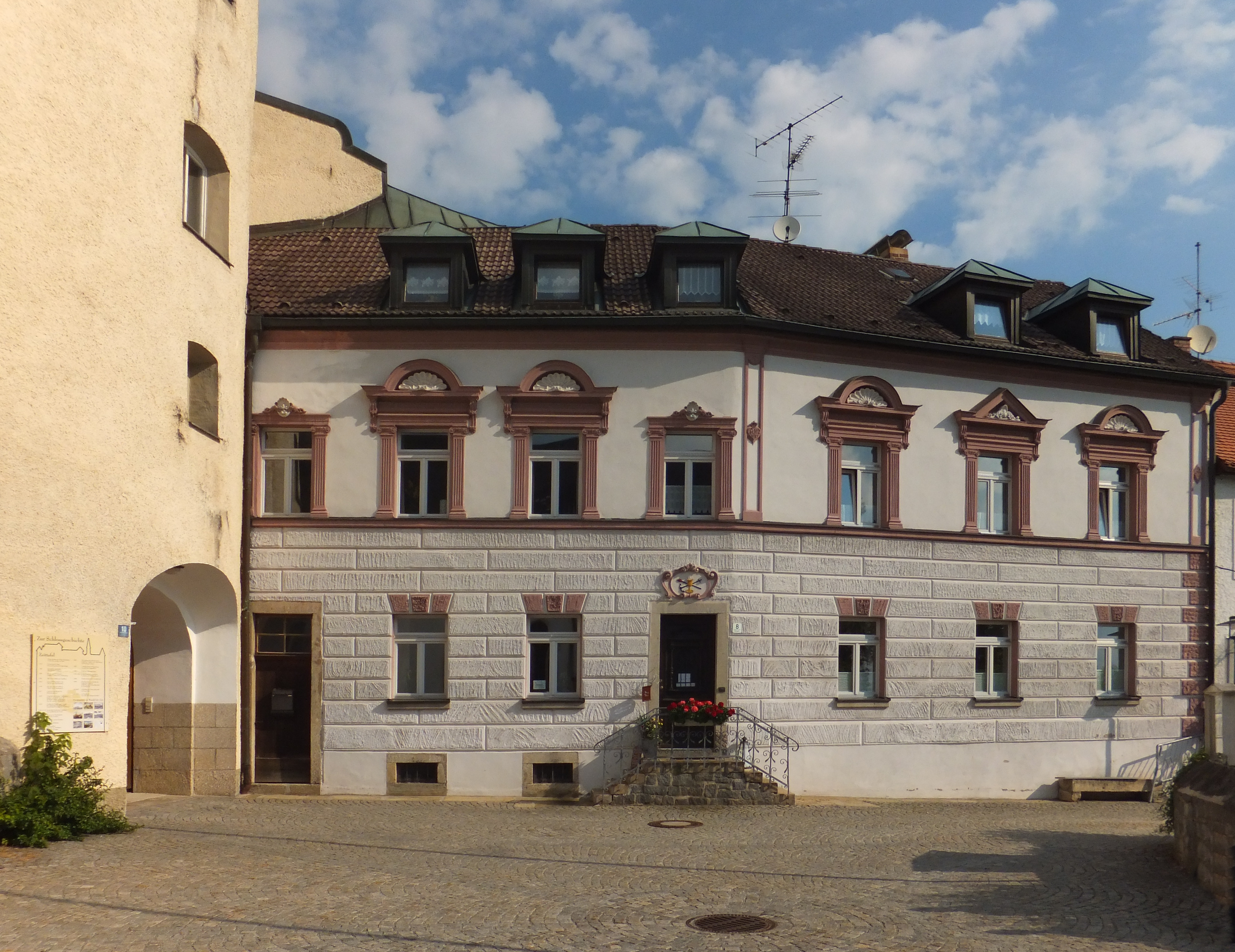 Burgstr 8 Pfarrhaus